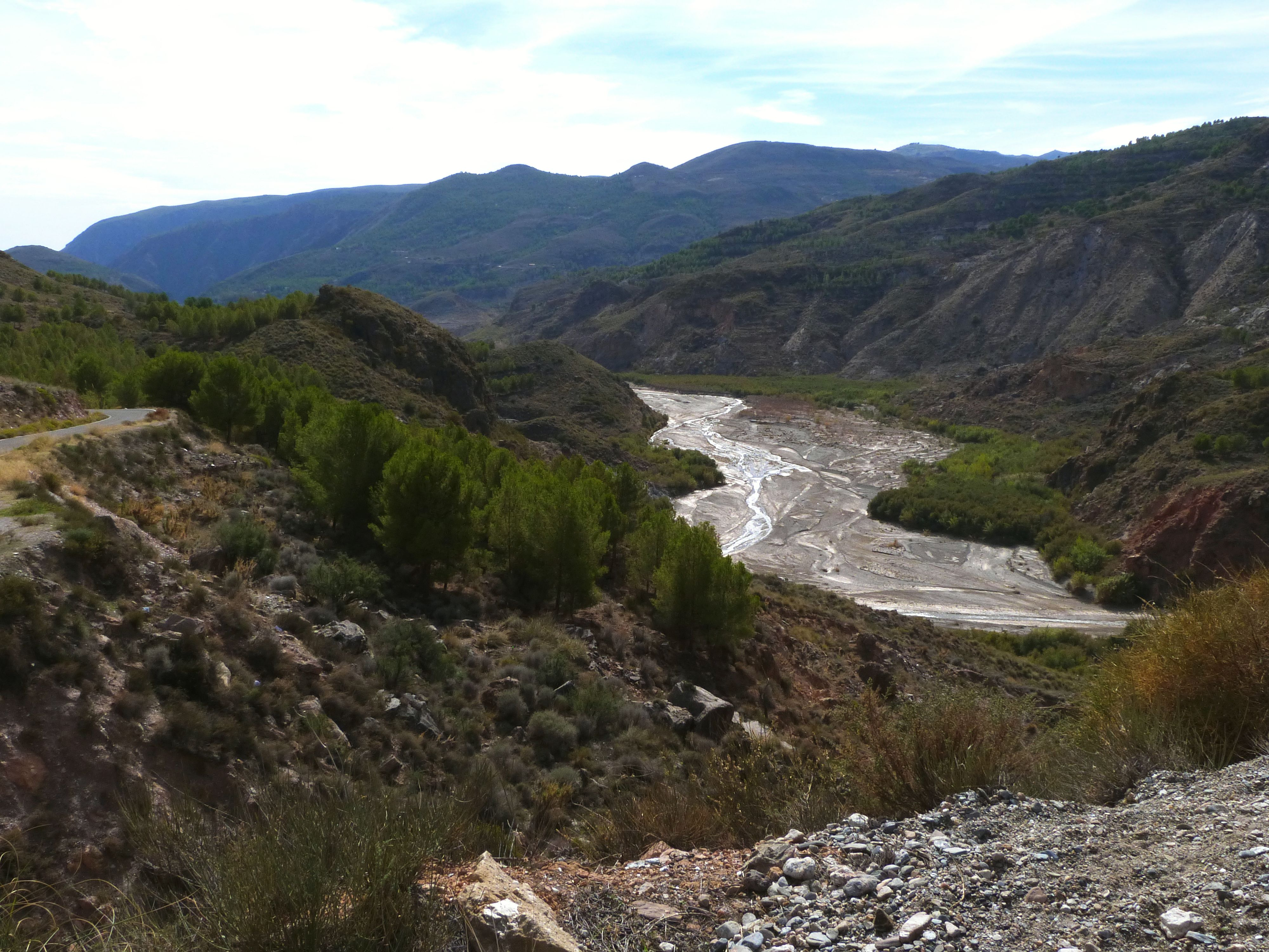 ausgetrockneter Nordteil des Béninar-Stausees